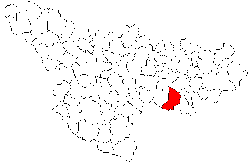 Categorie:Hărţi ale judeţului Timiş